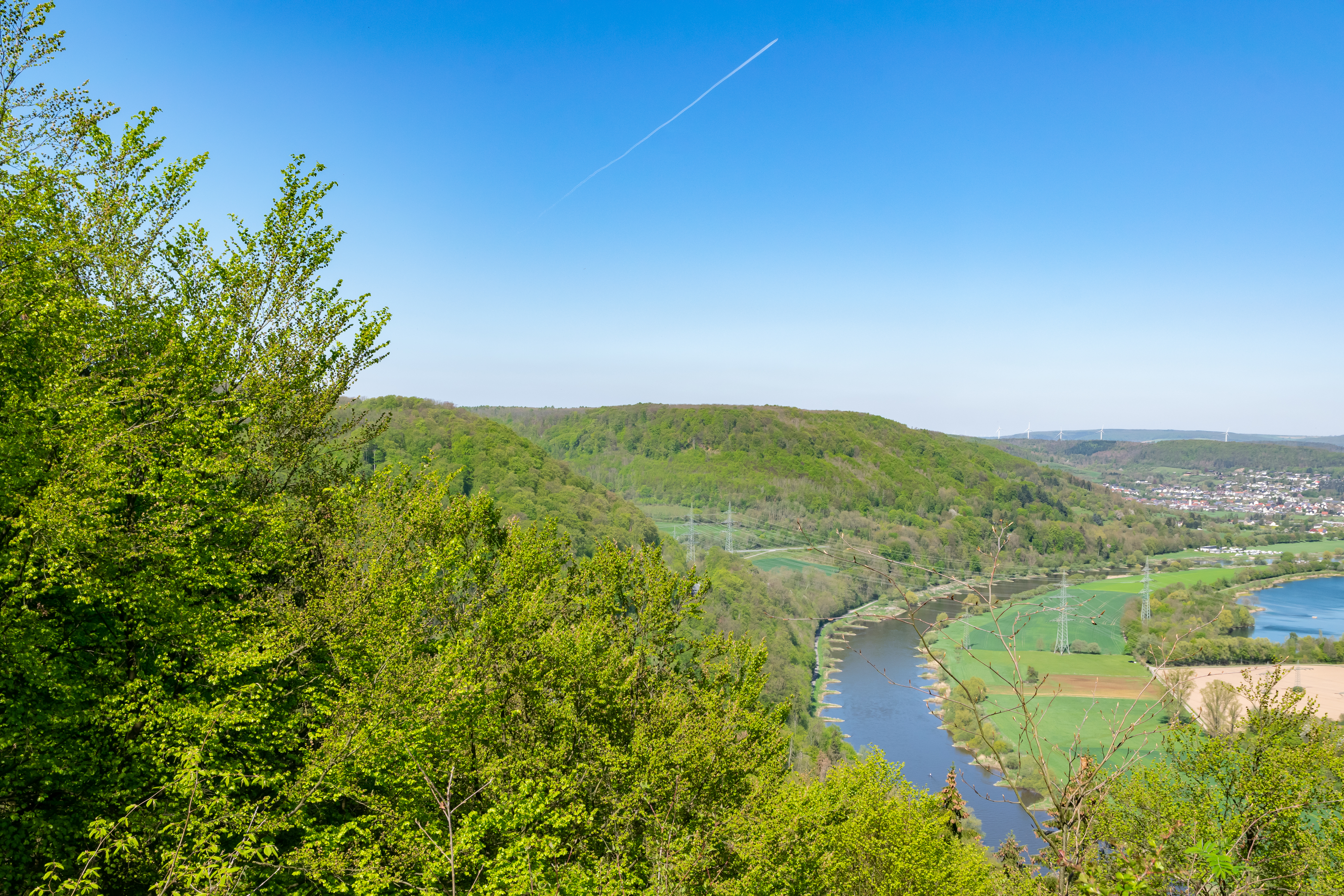 Naturschutzgebiet Buchenwälder zwischen Mühlenberg und Hasselburg in Beverungen, Kreis Höxter; Freileitungskreuzungen der Weser am Umspannwerk Würgassen WDPA-ID: 344631